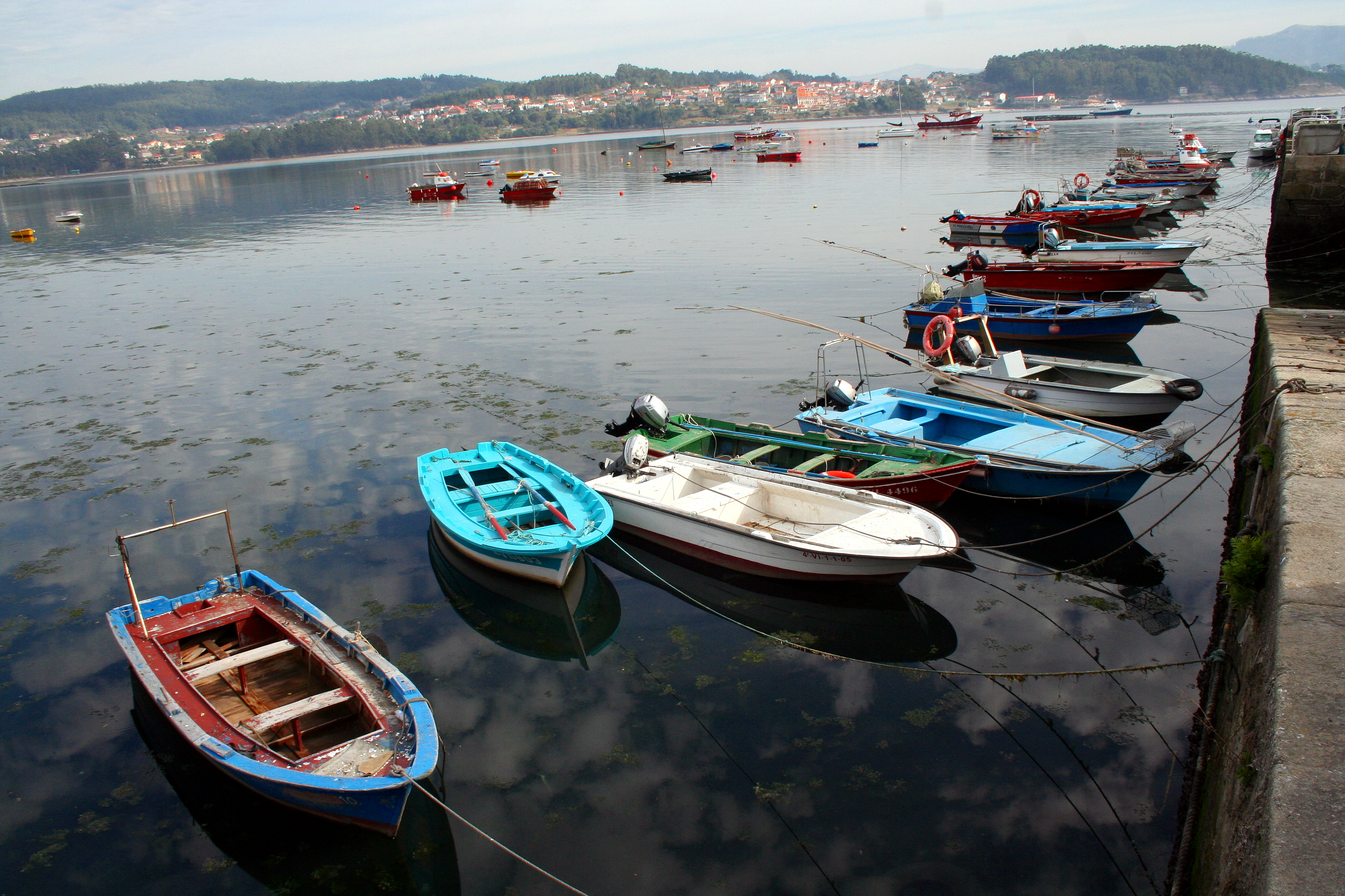 Puerto de Combarro, Pontevedra.